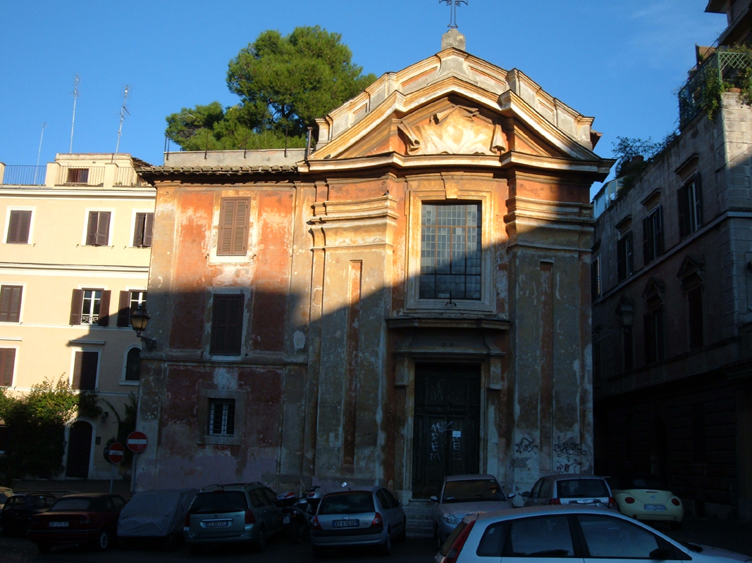 Chiesa di Santa Maria della Neve, a Roma, nel rione Monti.